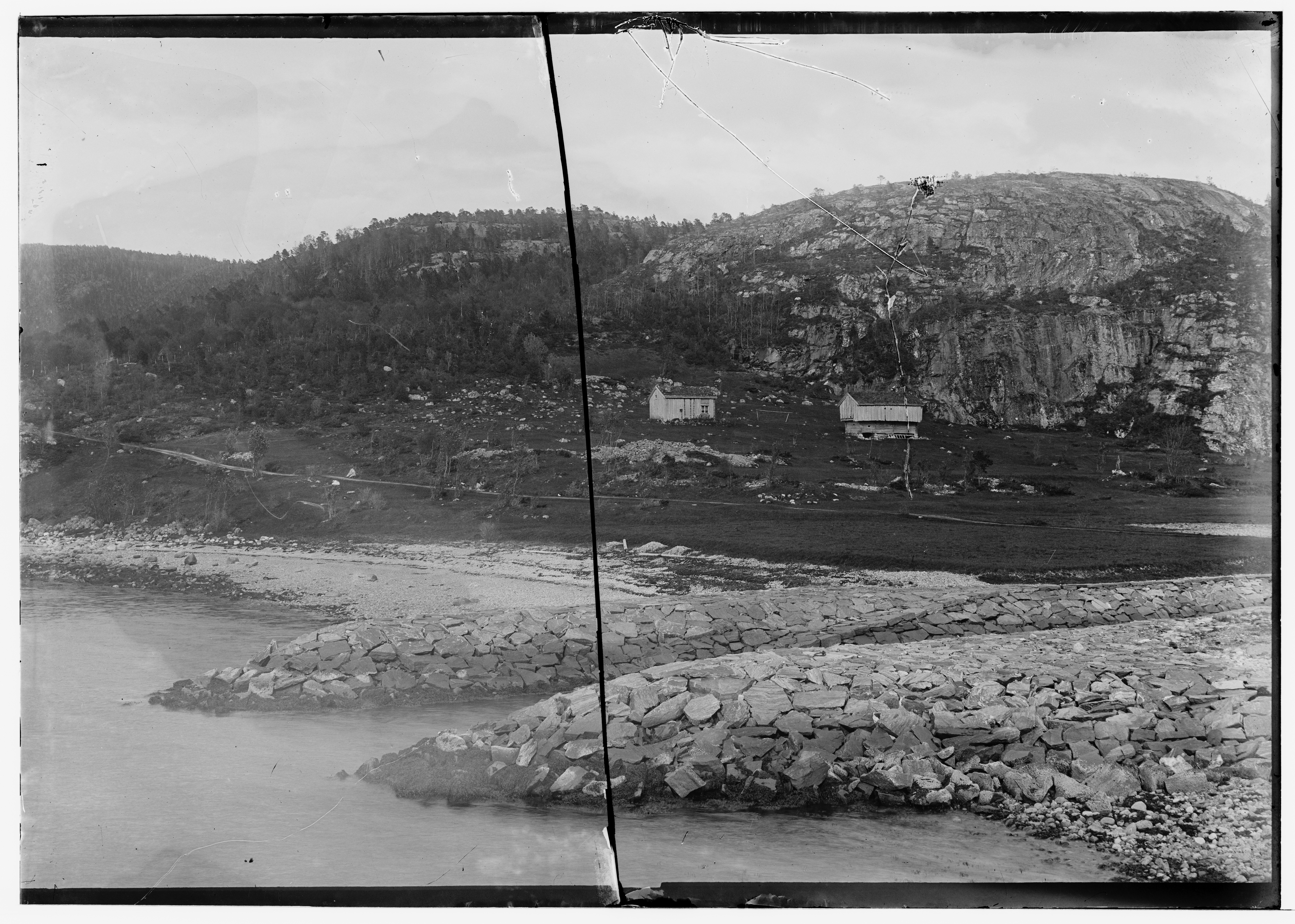 Bildet er hentet fra Arkivverket. Munningen av kanalen, Nålsundkanalen, Romsdals amt Arkivinstitusjon : Riksarkivet Arkivnavn : Havnedirektoratet Sted : Norge, Møre og Romsdal, Tingvoll, Nålsundkanalen Emneord: Kyst, Kanaler, Havneutbygging Avbildet